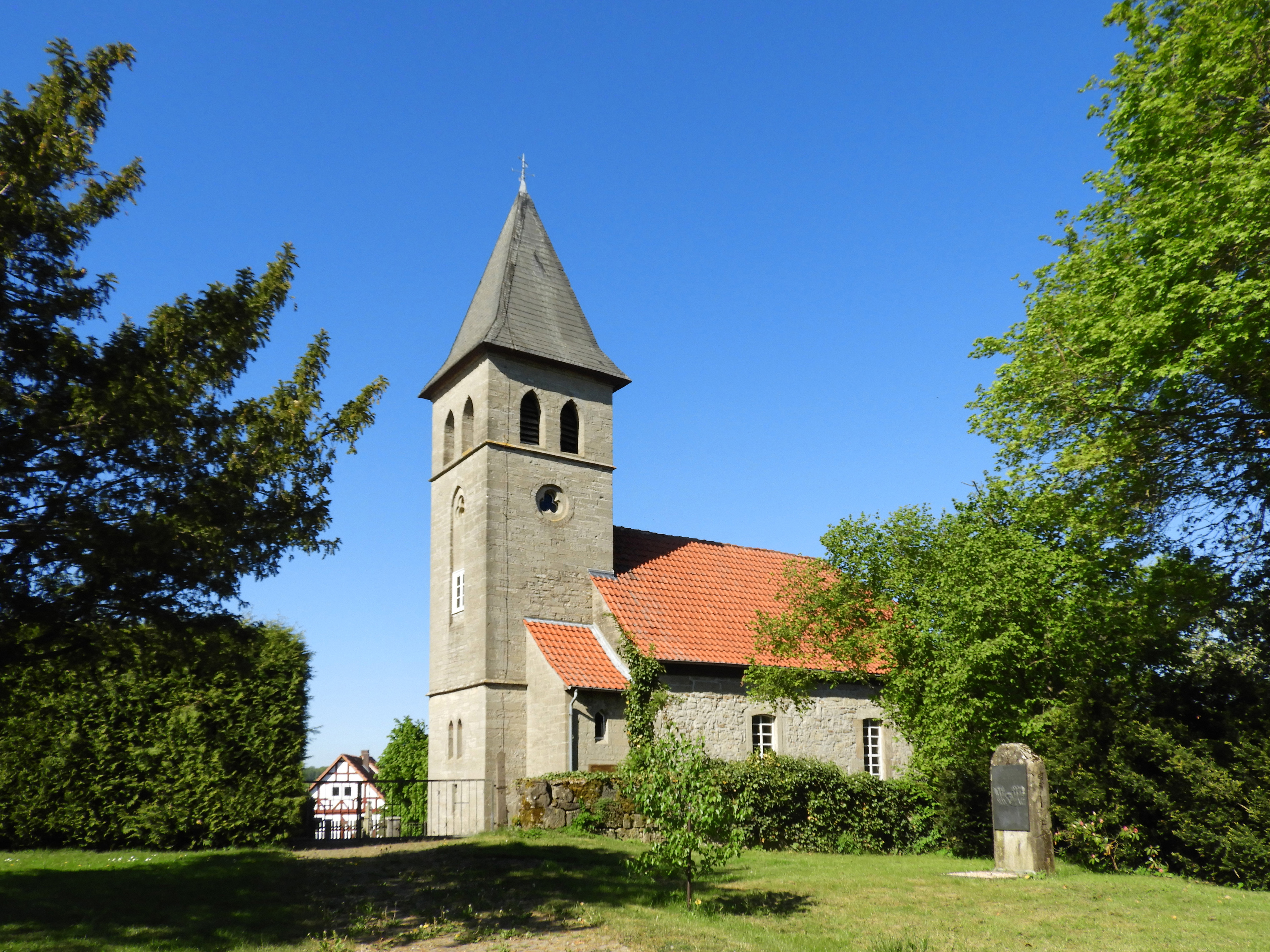 Die evangelische Kirche erhebt auf dem höchsten Platz Archfelds. Es wird angenommen, dass sie ursprünglich als Wehrkirche diente, in der die Bevölkerung in Notzeiten Zuflucht finden konnte. Von dem ursprünglichen Kirchenbau ist nichts mehr vorhanden. Der älteste Teil ist das Langhaus aus dem Jahr 1567. Der Turm wurde in 1903 erbaut, nachdem der ursprüngliche durch ein Feuer vernichtet worden war. Im Innern erhebt sich ein einfacher Saal mit einer abschließenden Rundtonne. Die Ausstattung stammt ebenso wie der Turm aus dem Jahr 1903. Wegen ihrer künstlerischen, geschichtlichen und städtebaulichen Bedeutung ist die Kirche ein geschütztes Kulturdenkmal Archfeld ist ein Ortsteil der Gemeinde Herleshausen im nordhessischen Werra-Meißner-Kreis.